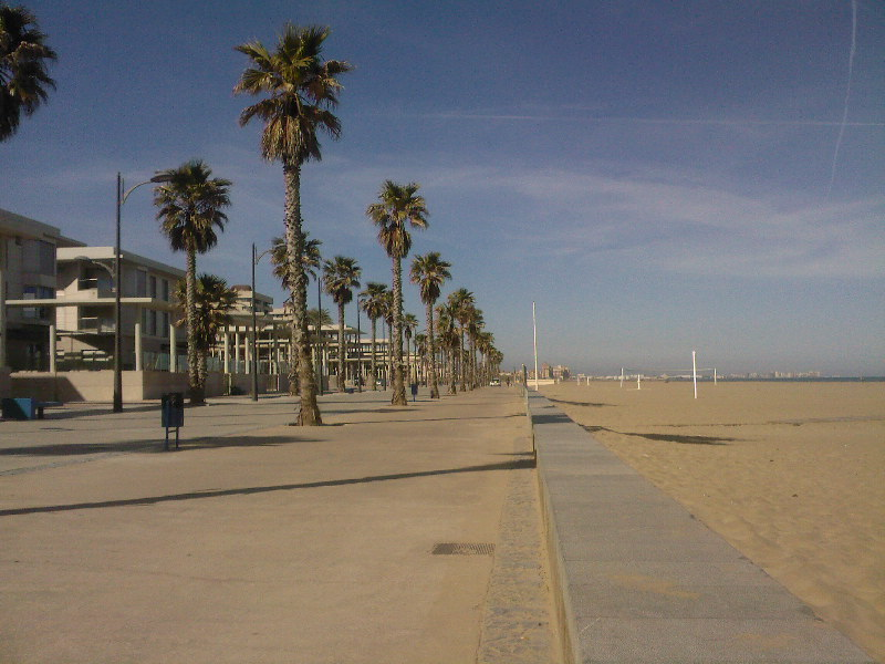 Platja_de_la_Patacona_d'Alboraia-Març2009 HORTA NORD